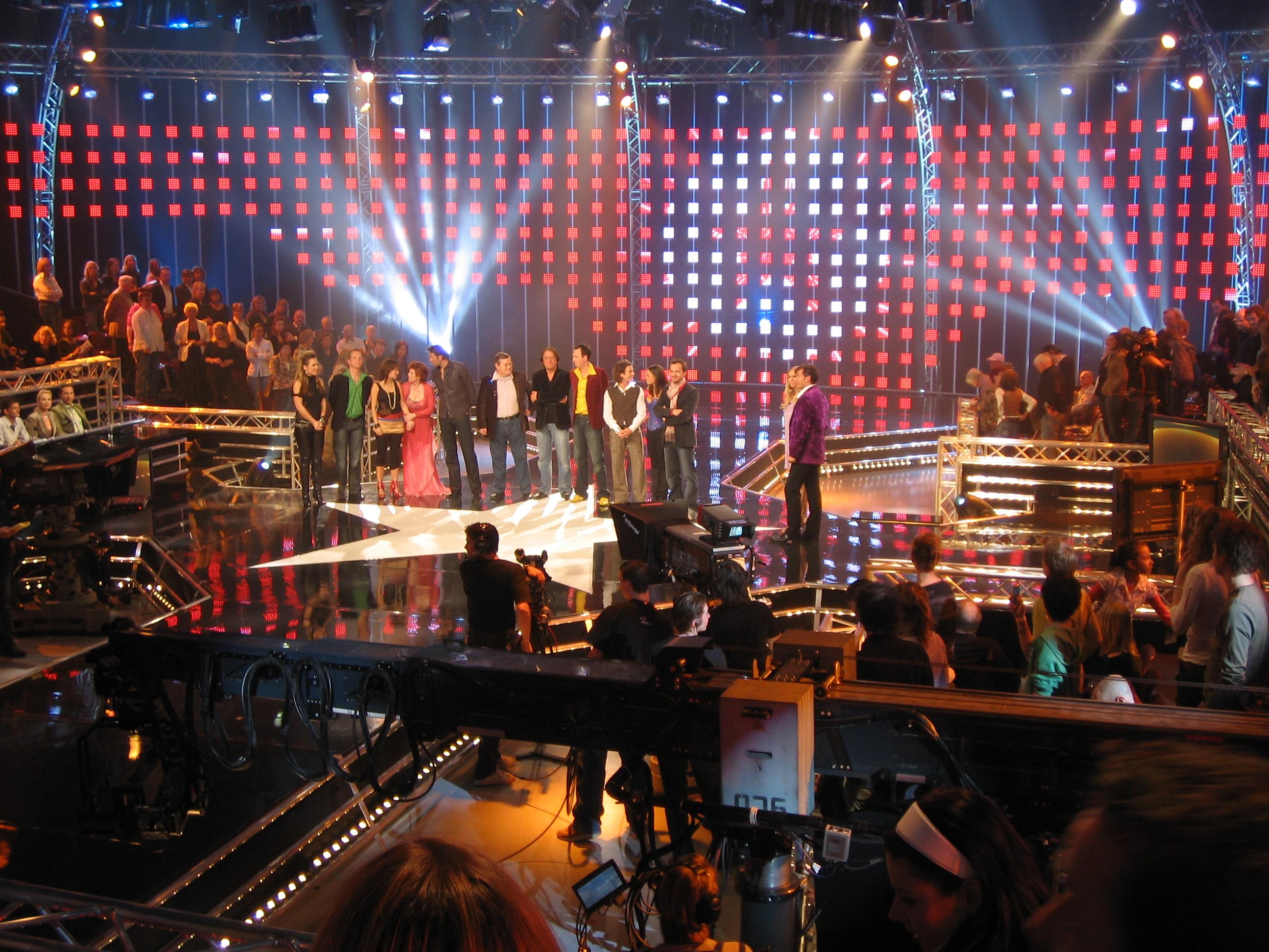 Gisteravond, in Studio 22 op het Mediapark, tijdens de eerste live uitzending van het nieuwste SBS 6 programma So you wannabe a Popstar?. 11 semi bekende Nederlanders gooien het dit keer niet op een schaats- maar zangcarriere. Samen met Dennis, Joshua, Kirsten en Femke en een paar honderd gillende fans van De website waar we anderhalve week aan gewerkt hebben is op de eerste dag (vandaag) na het programma al een enorm succes: meer dan 23.000 bezoeken en meer dan 150.000 pageviews.